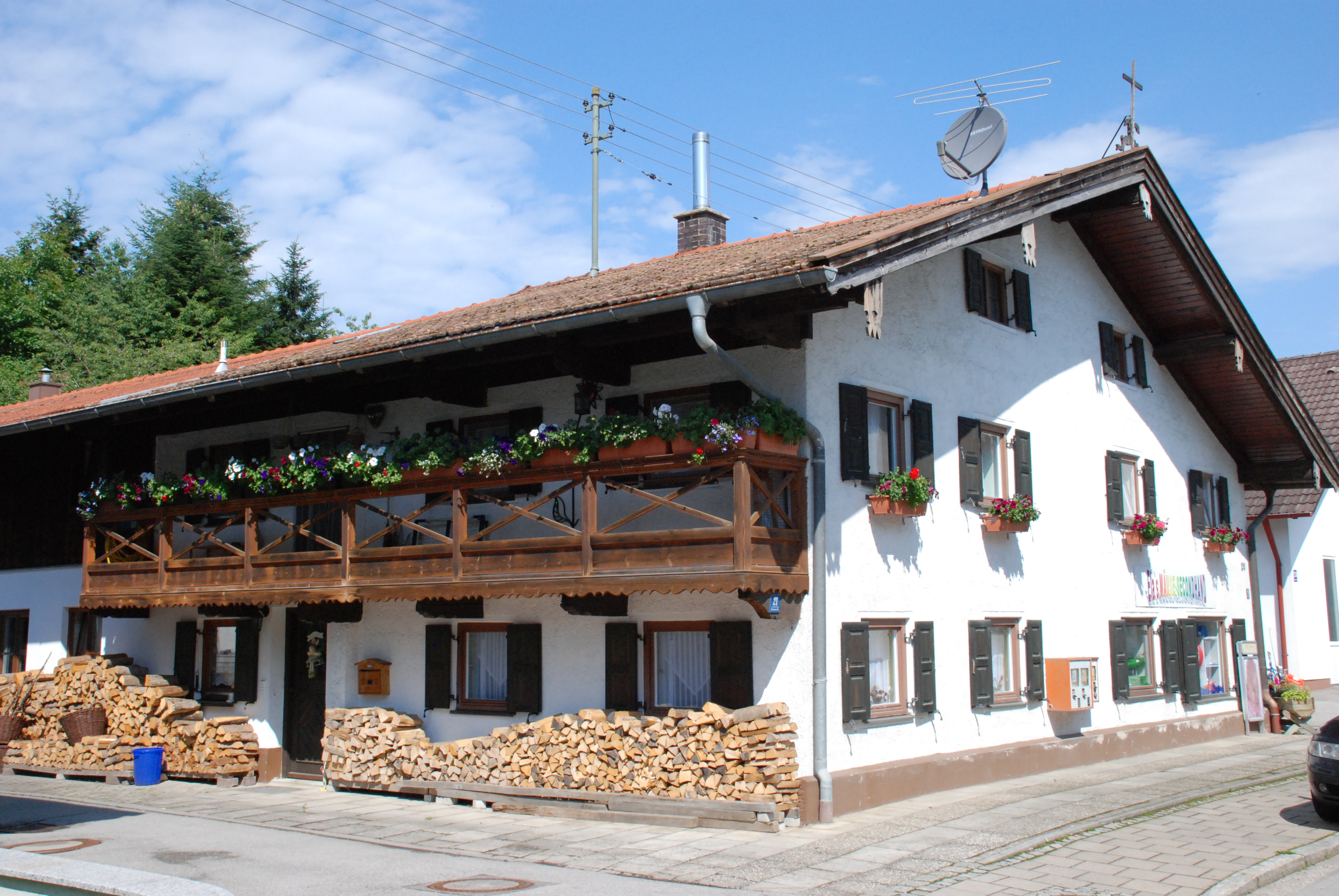 Ehemaliges Bauernhaus "Beim Schmid" in der Ottobrunner Straße 21 in Faistenhaar, Gemeinde Brunnthal, Landkreis München, Regierungsbezirk Oberbayern, Bayern. Als Baudenkmal in der Bayerischen Denkmalliste aufgeführt. Foto gemäß den Voraussetzungen zur Panoramafreiheit von öffentlicher Verkehrsfläche aus aufgenommen.